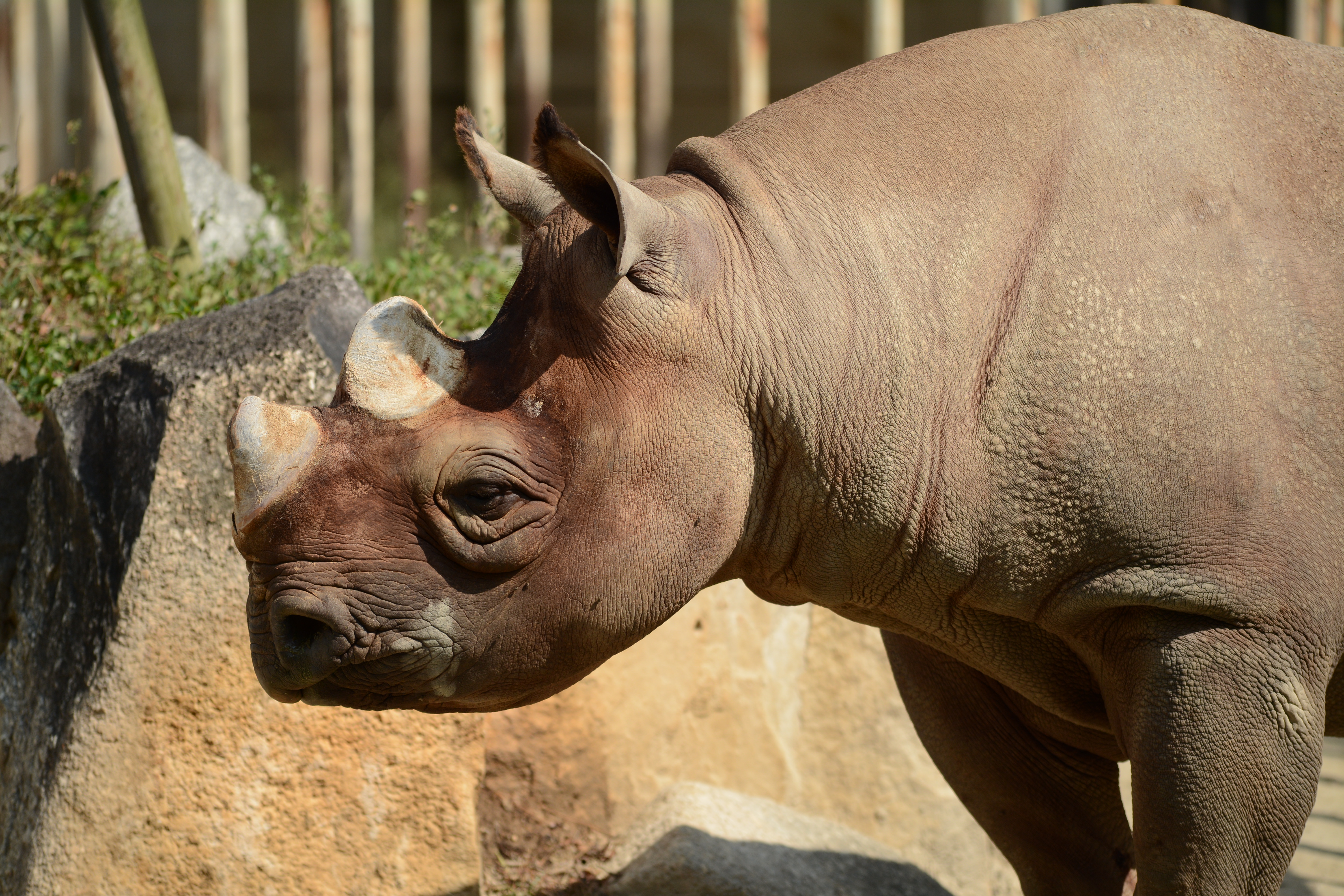 クロサイ（東山動植物園）